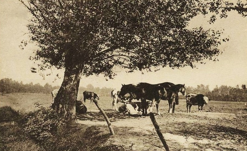 Normandie, pour Auguste Bunoust ; carte postale ancienne (non grevée de droits).